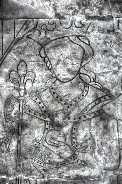 Náhrobek Kunhuty Uherské